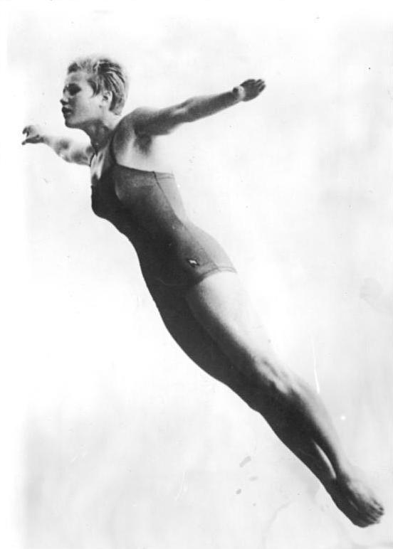 Zentralbild-Kohls We-bs 23.8.1962 X. Europameisterschaften im Schwimmen, Springen und Wasserball 1962 in Leipzig.Im Turmspringen der Frauen errang Ingrid Krämer (DDR) mit 107,96 Punkten die Goldmedaille. Auf den Plätzen folgen Minel Krutowa (SU) und Gabriele Schöpe (DDR). Ingrid Krämer beim Sprung.